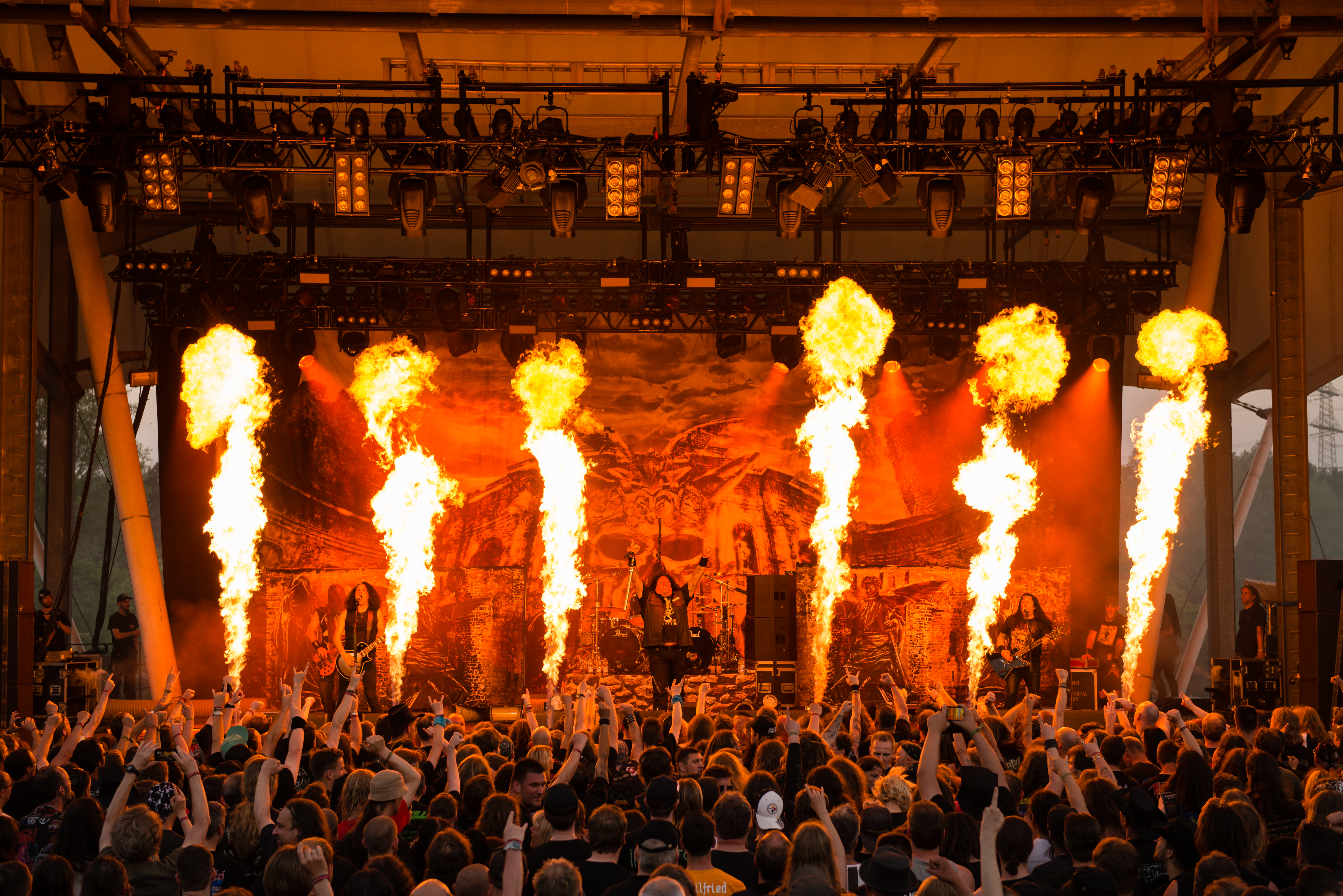 'Rock Hard Festival 2014 - Gelsenkirchen': 'Testament'